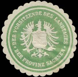 Sealing stamp Title: Der Vorsitzende des Landtages der Provinz Sachsen Description: grün, weiß, geprägt Place: Dresden size: 3 cm